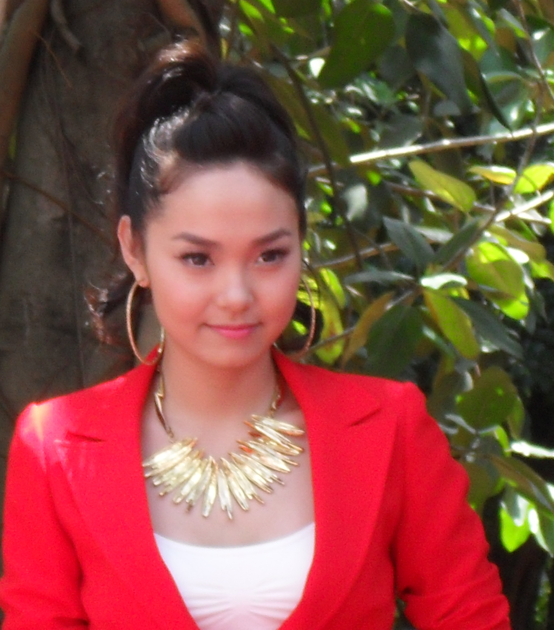 Ca sĩ MInh Hằng tại KDL Suối Tiên